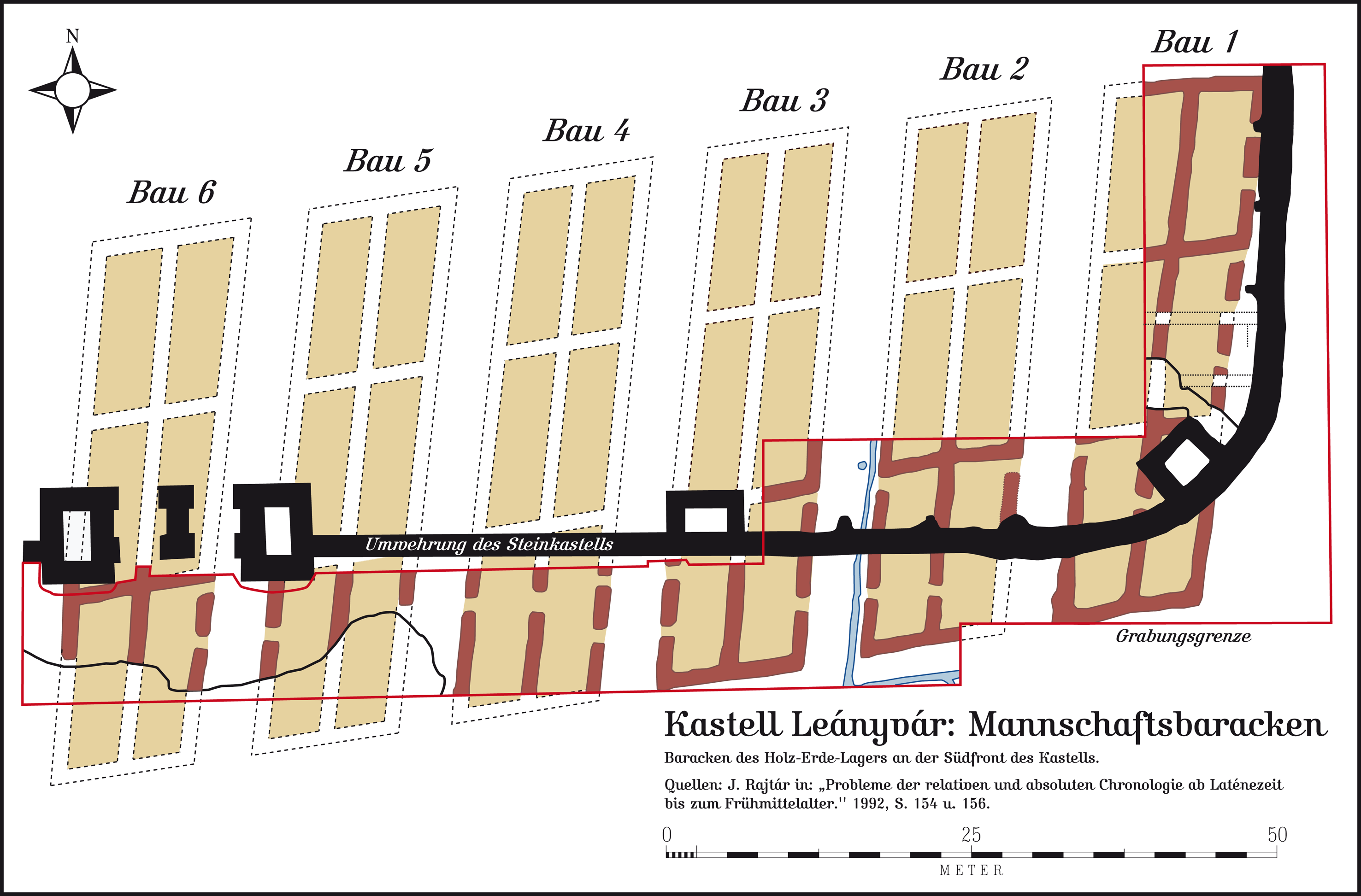 Kastell Iža-Leányvár: Mannschaftsbaracken des kurzlebigen Holz-Erde-Lagers aus der Zeit der Markomannenkriege.